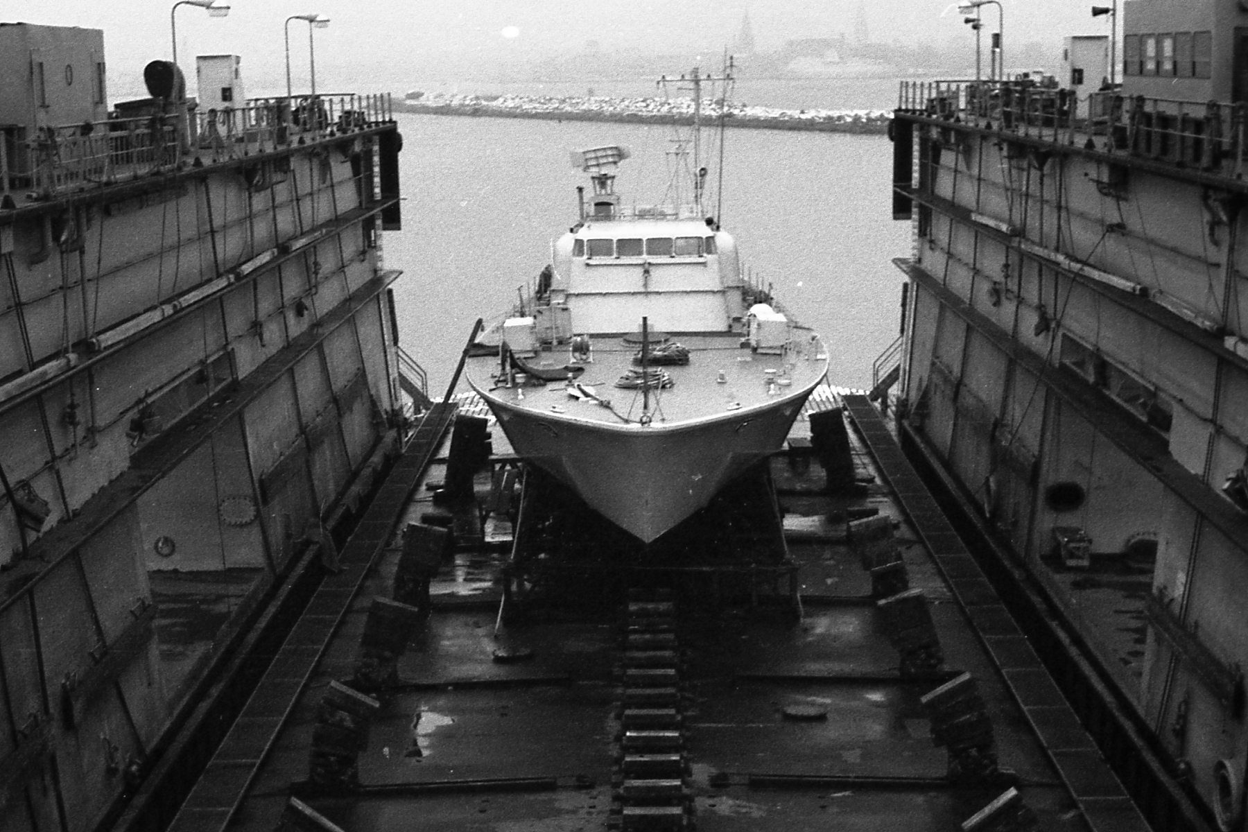 S-Boot Pfeil